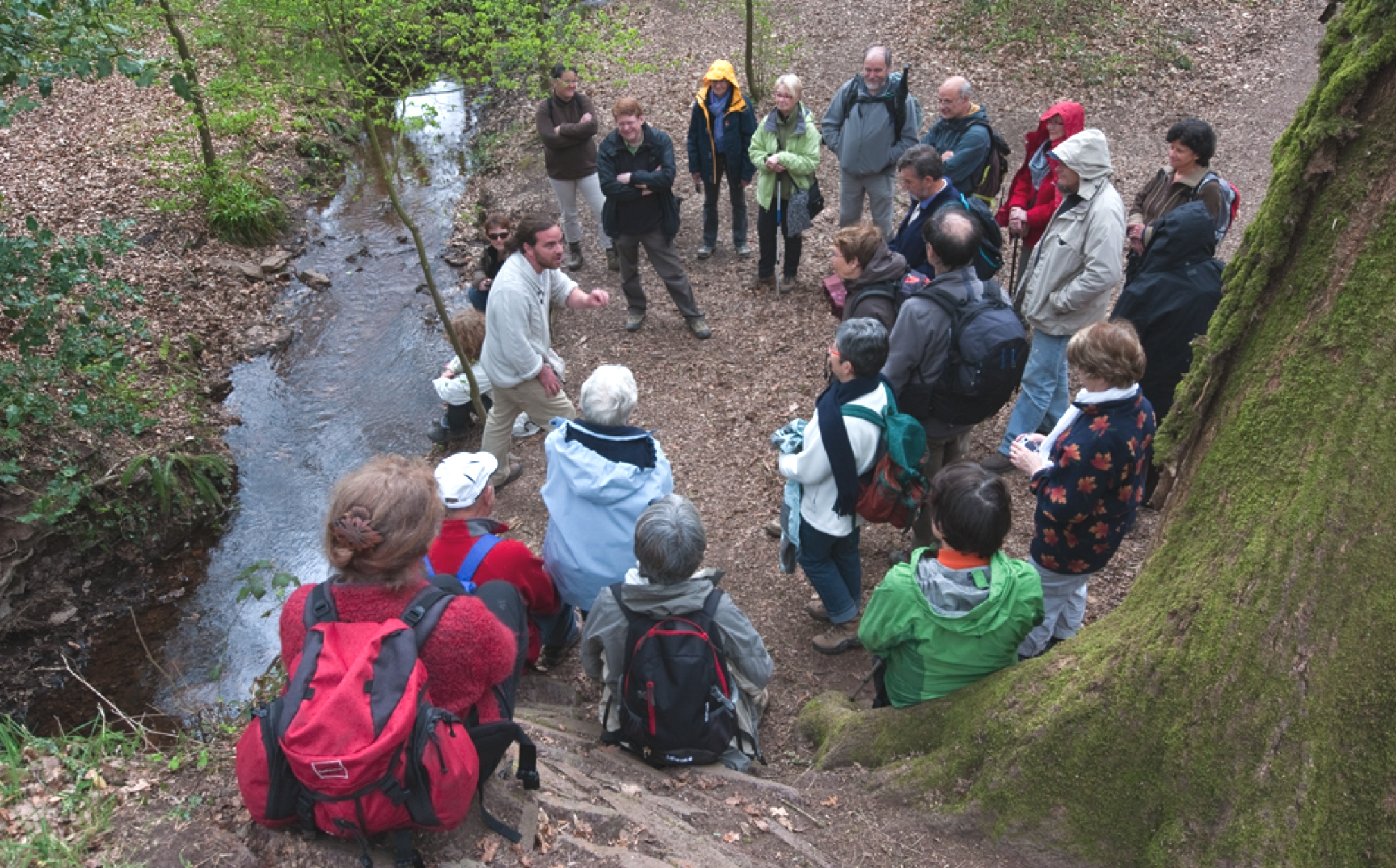 Nicolas Mezzalira contant lors d'un guidage dans la forêt de Brocéliande (avril 2012).